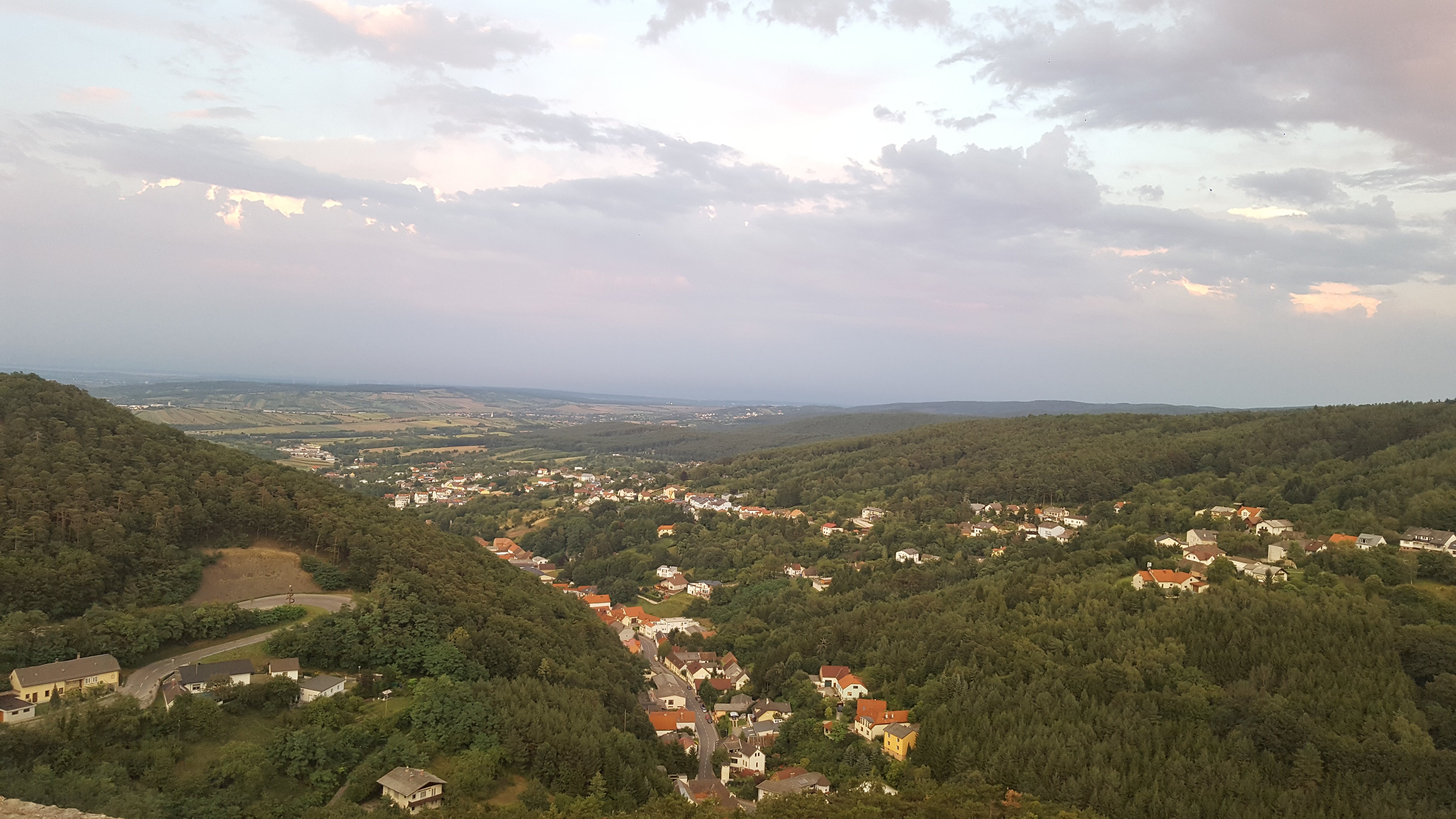 Blick von der Burg auf die Gemeinde Forchtenstein entlang der Hauptraße heute